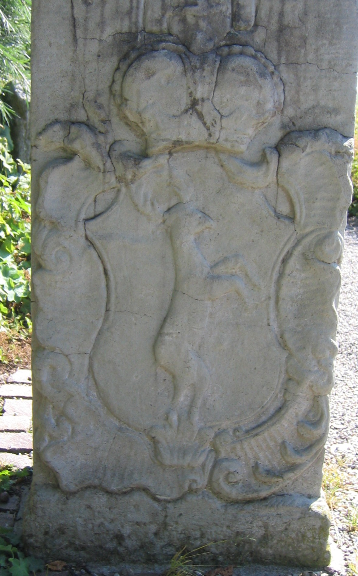 Grenzstein zwischen Josef Wenzel zu Fürstenberg Fürstenhaus Fürstenberg und Fürstabt Martin Gerbert (Kloster St. Blasien) aus dem Jahr 1767